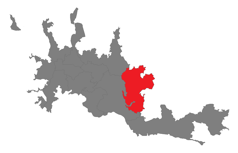 comuna ecoturistico cerro de oro de manizales